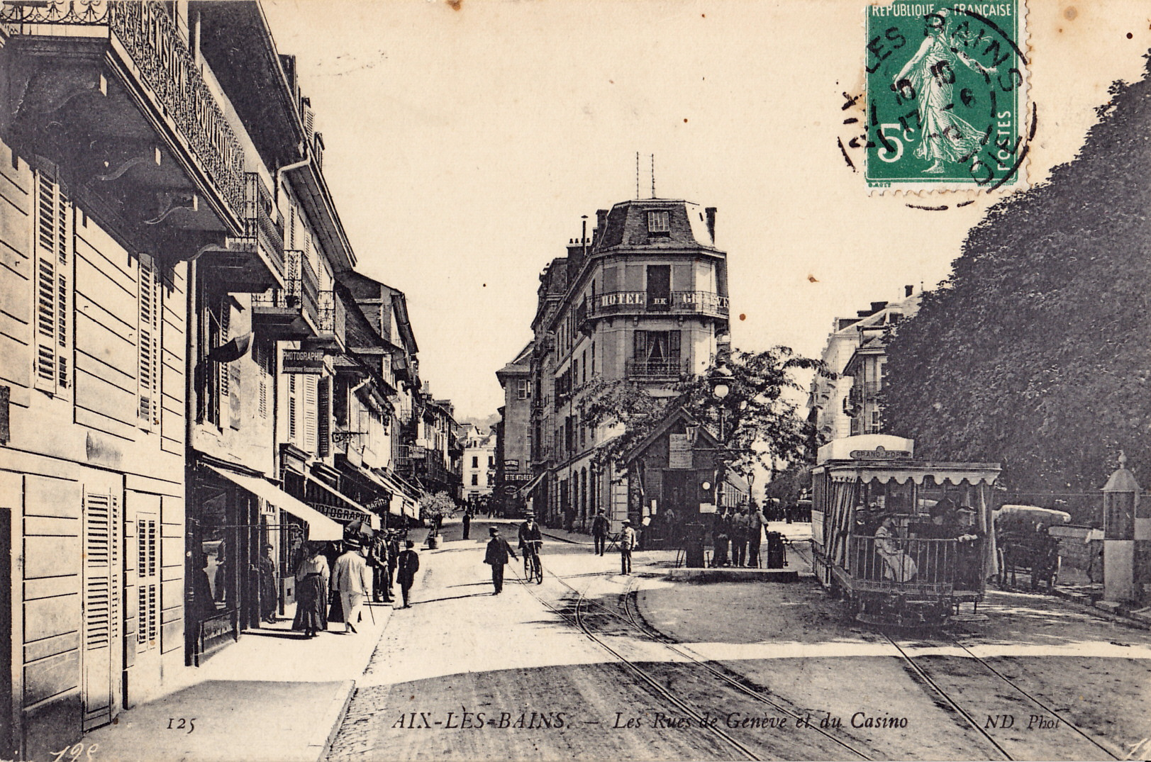 Car te postale ancienne éditée par ND à Paris, n°125 :aIX-LES-BAINS - Les rues de Genève et du Casino